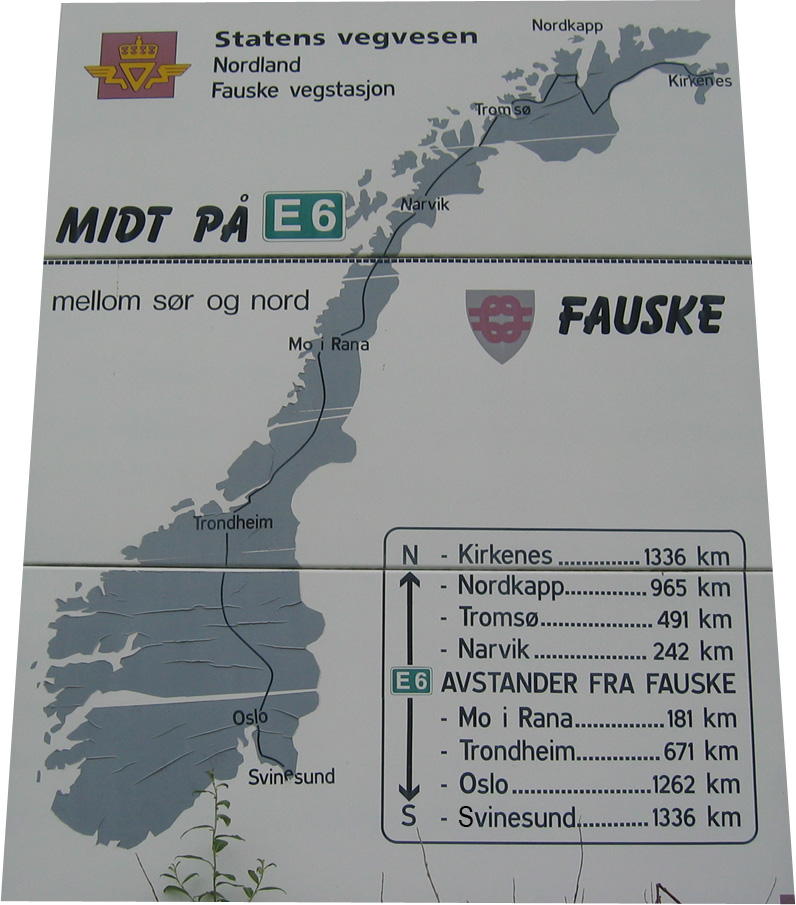 Skilt på Fauske vegstasjon «midt på E6»